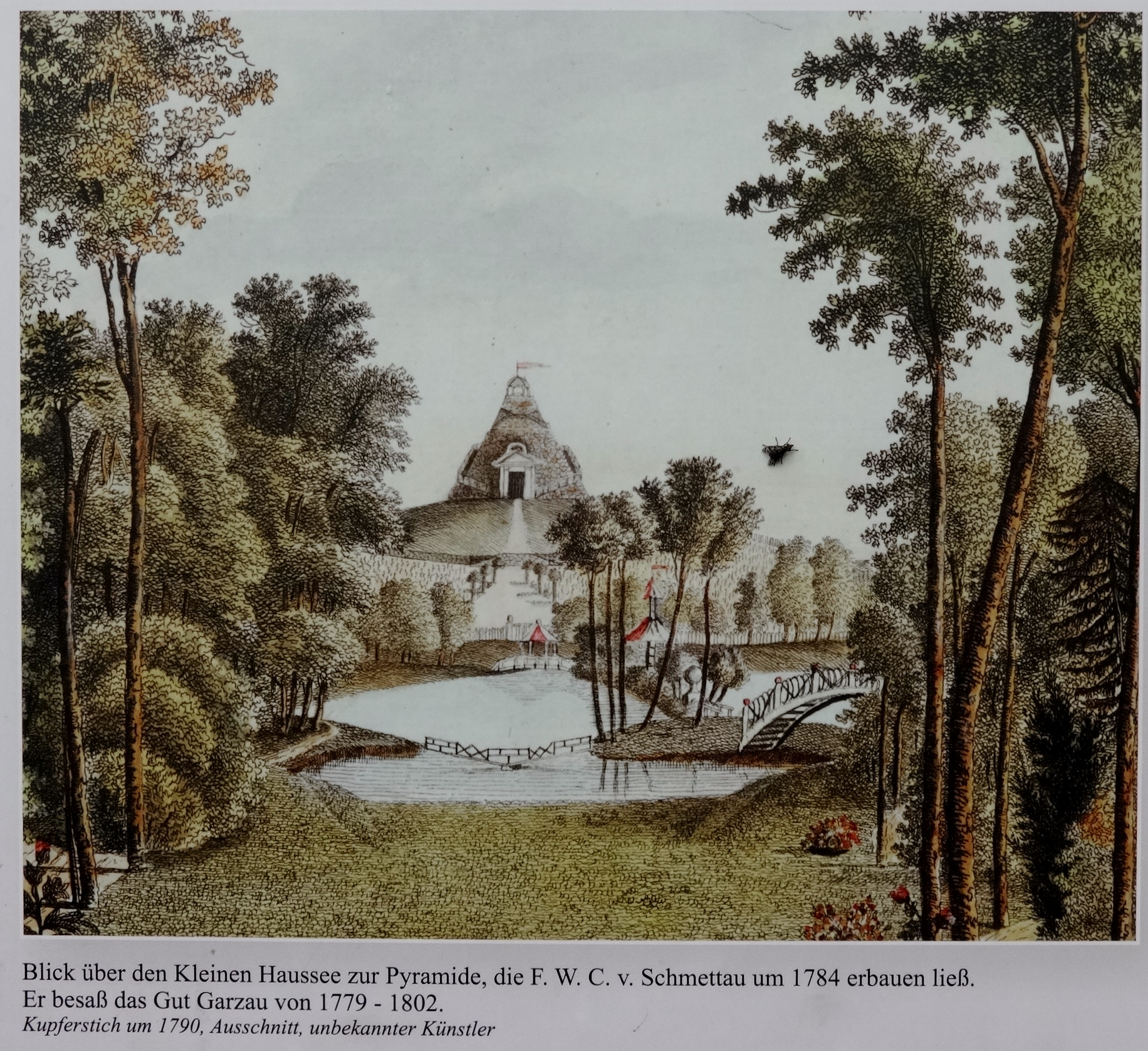 Pyramide des Grafen von Schmettau mit Landschaftspark und Schloss Garzau in Garzau-Garzin, Brandenburg um 1700, aufgenommen auf einer öffentlich zugänglichen Abbildung im Park